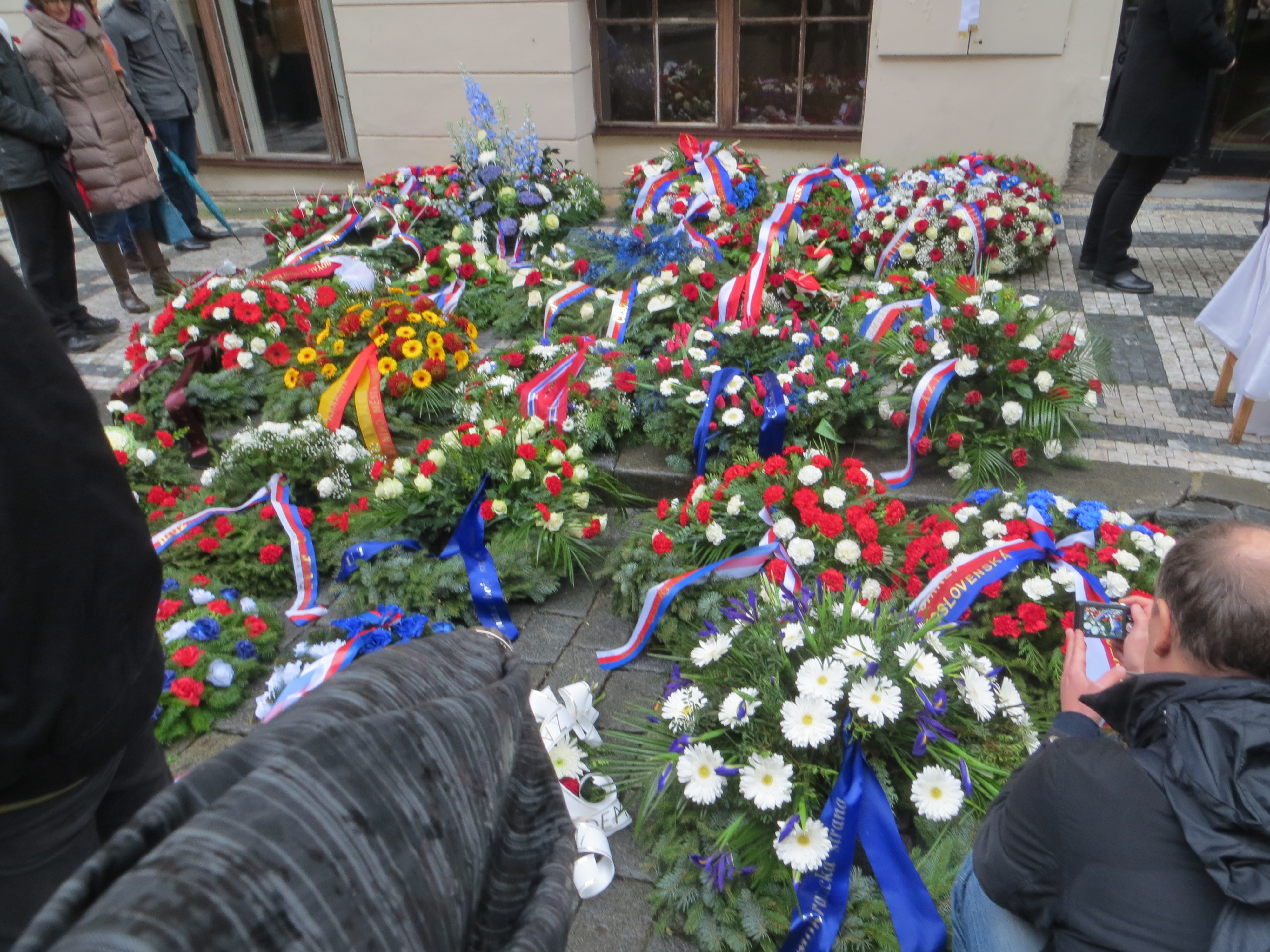 Vzpomínková slavnost k uctění památky Jana Opletala